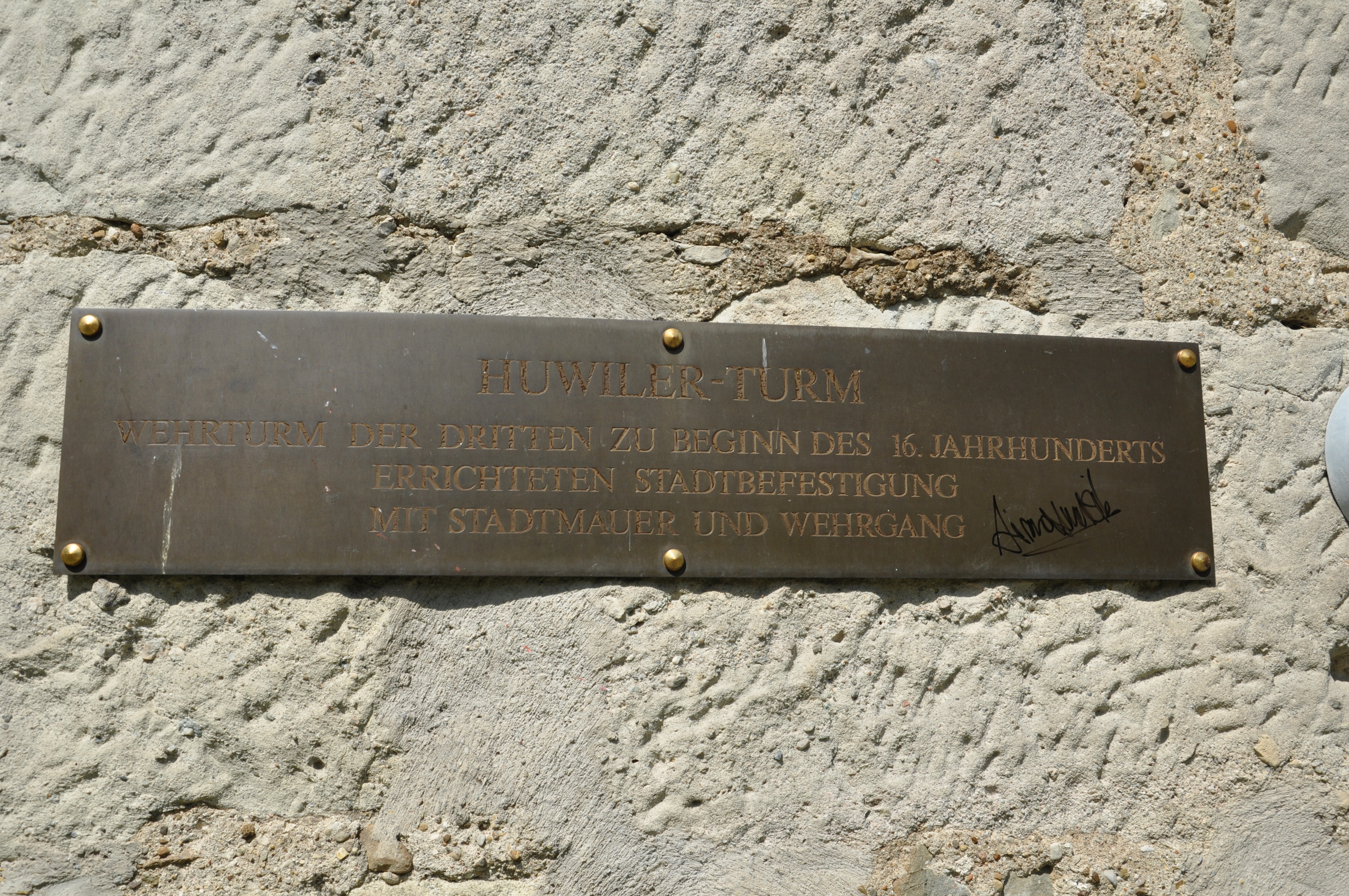 Zug Huwilerturm